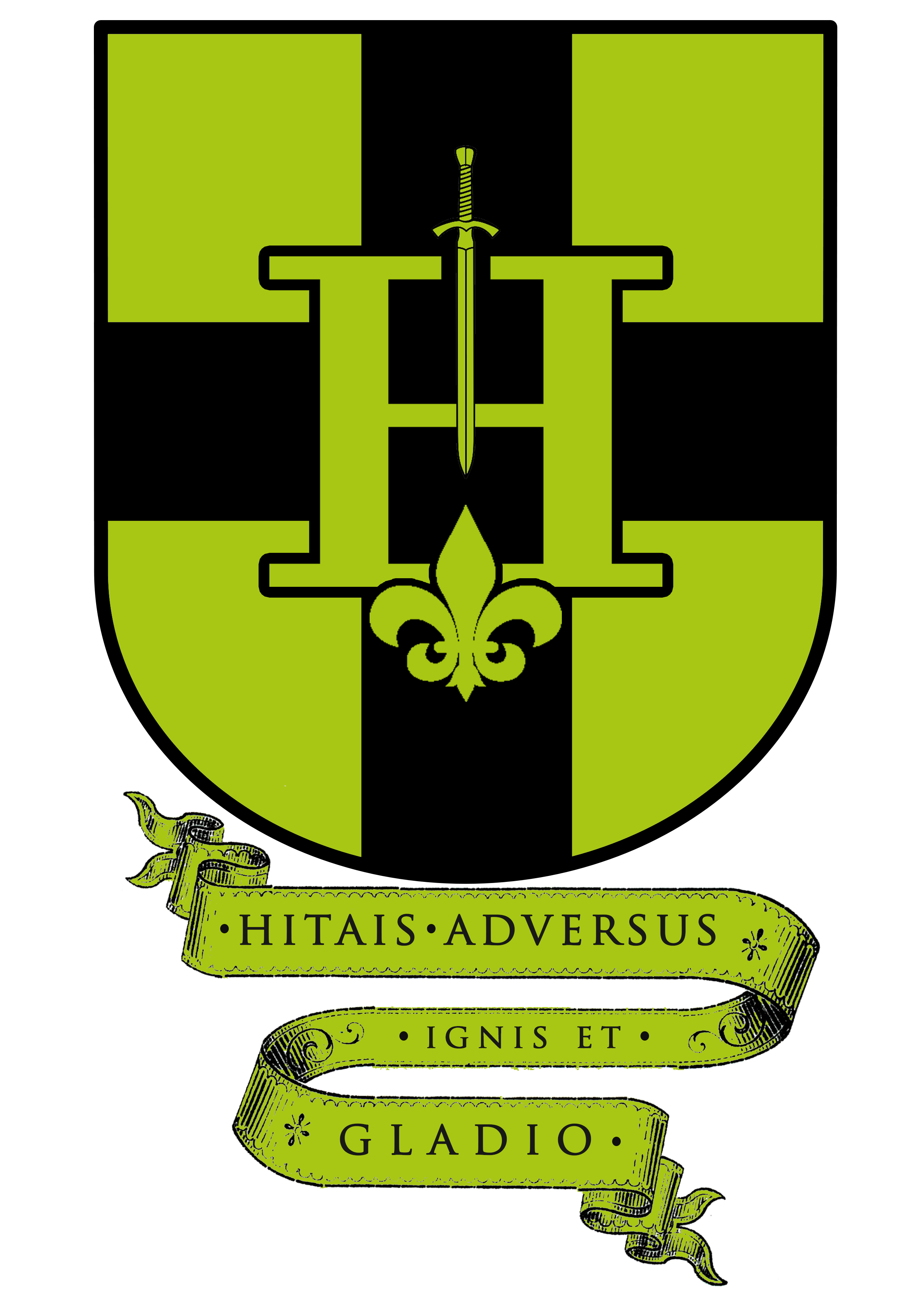 Stemma della famiglia Hitais - Hitai Signori di Saseno